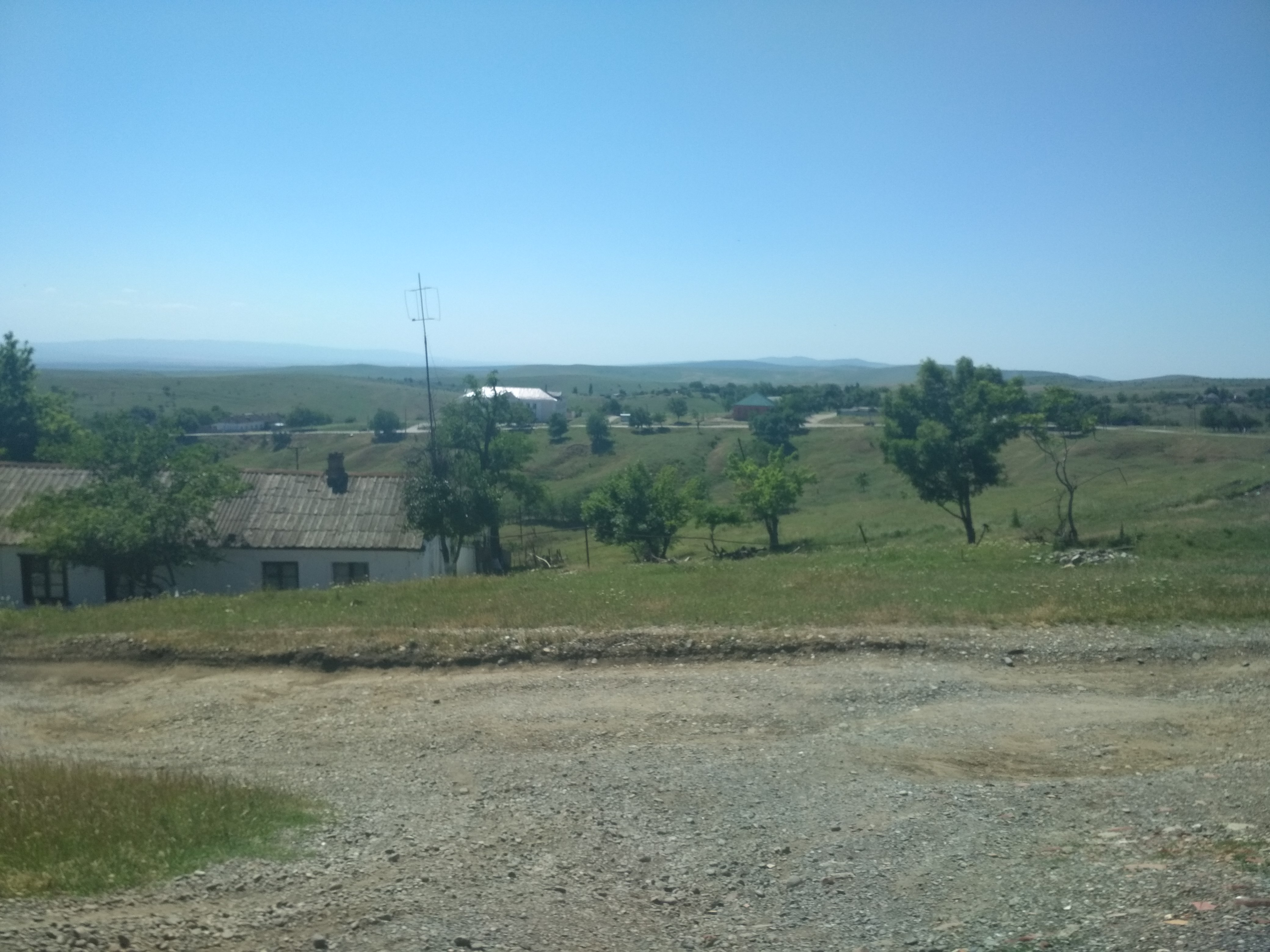 Нохчийн: Чучо-КӀотар